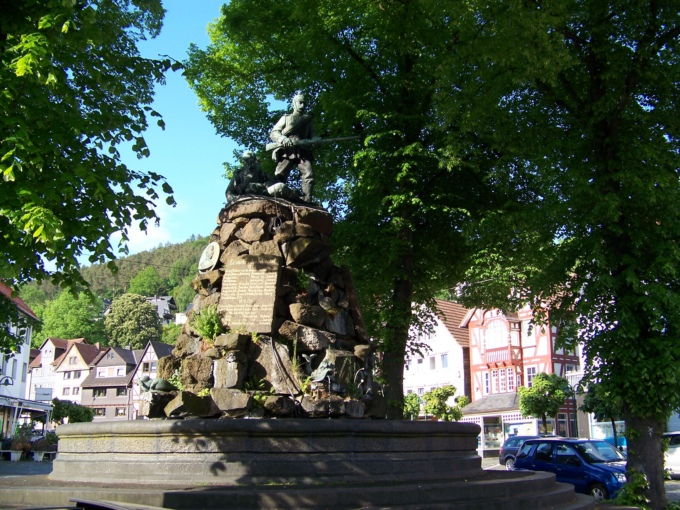 Kreiskriegerdenkmal in Biedenkopf am Marktplatz Vorderansicht